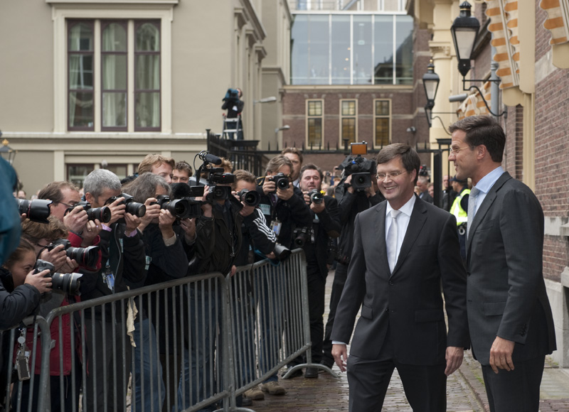 14/10/10: Scheidend premier Jan Peter Balkenende ontvangt zijn opvolger Mark Rutte bij de ingang van het Torentje.